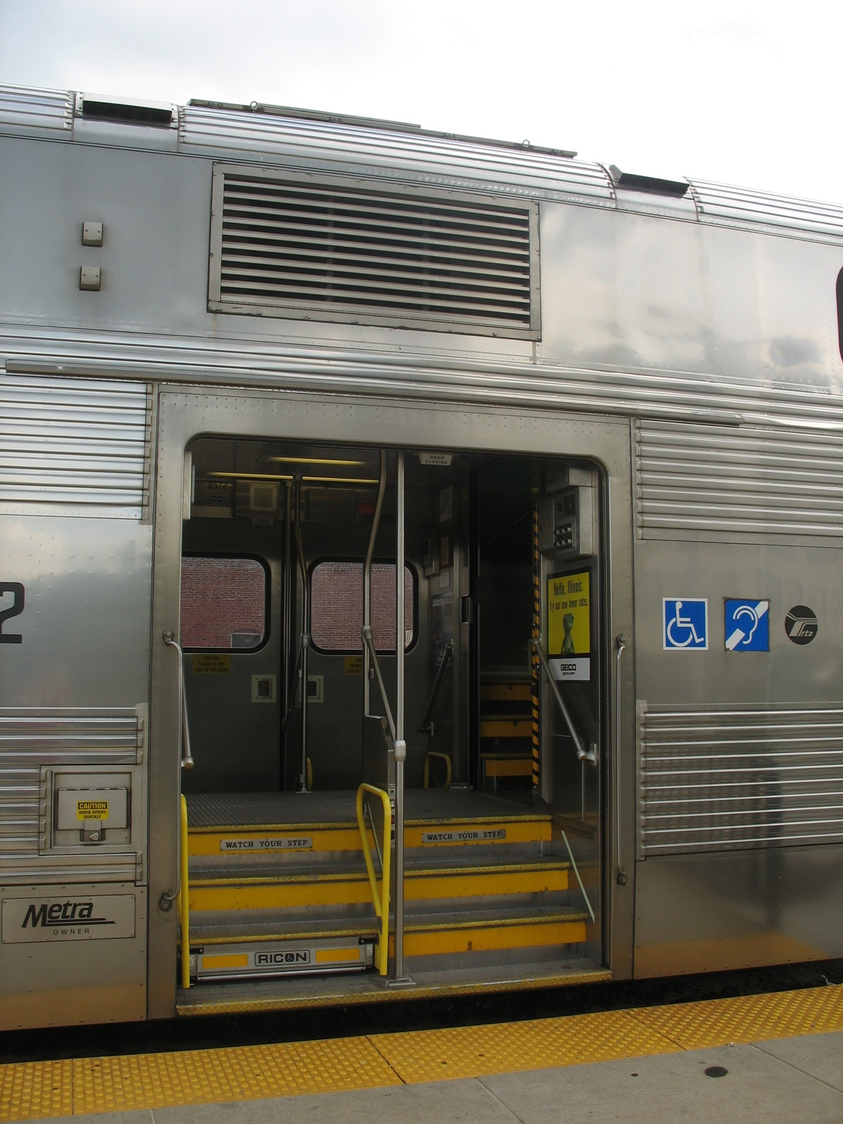 Joliet, IL